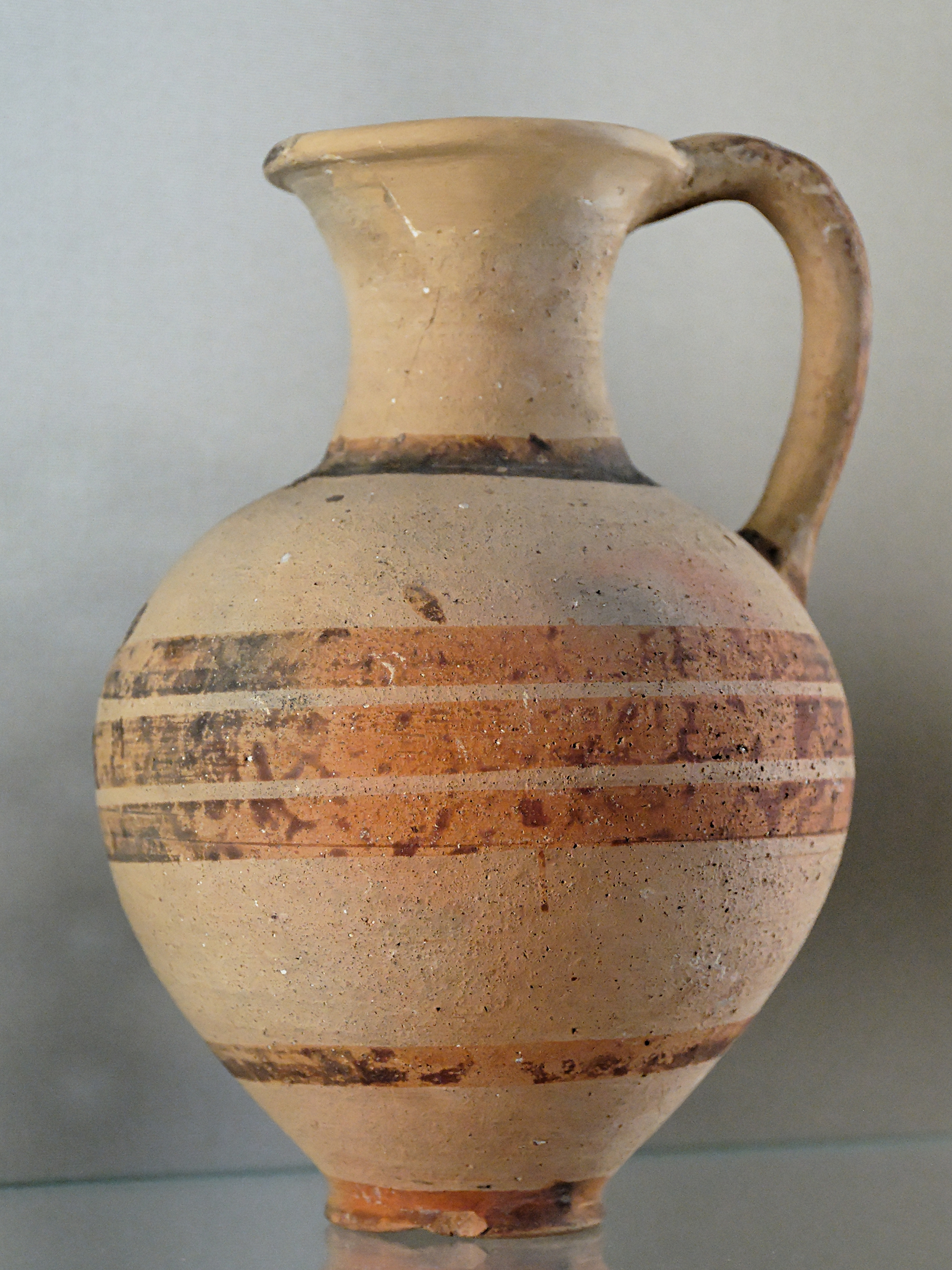 Provenance: Enkomi, Cyprus